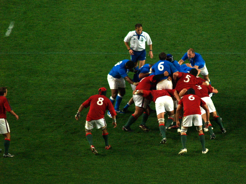 Match Italie contre le Portugal - Coupe du Monde de Rugby 2007